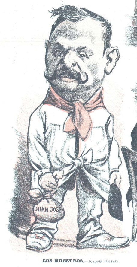 Caricatura.